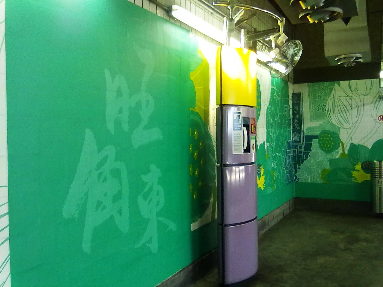 旺角東站1